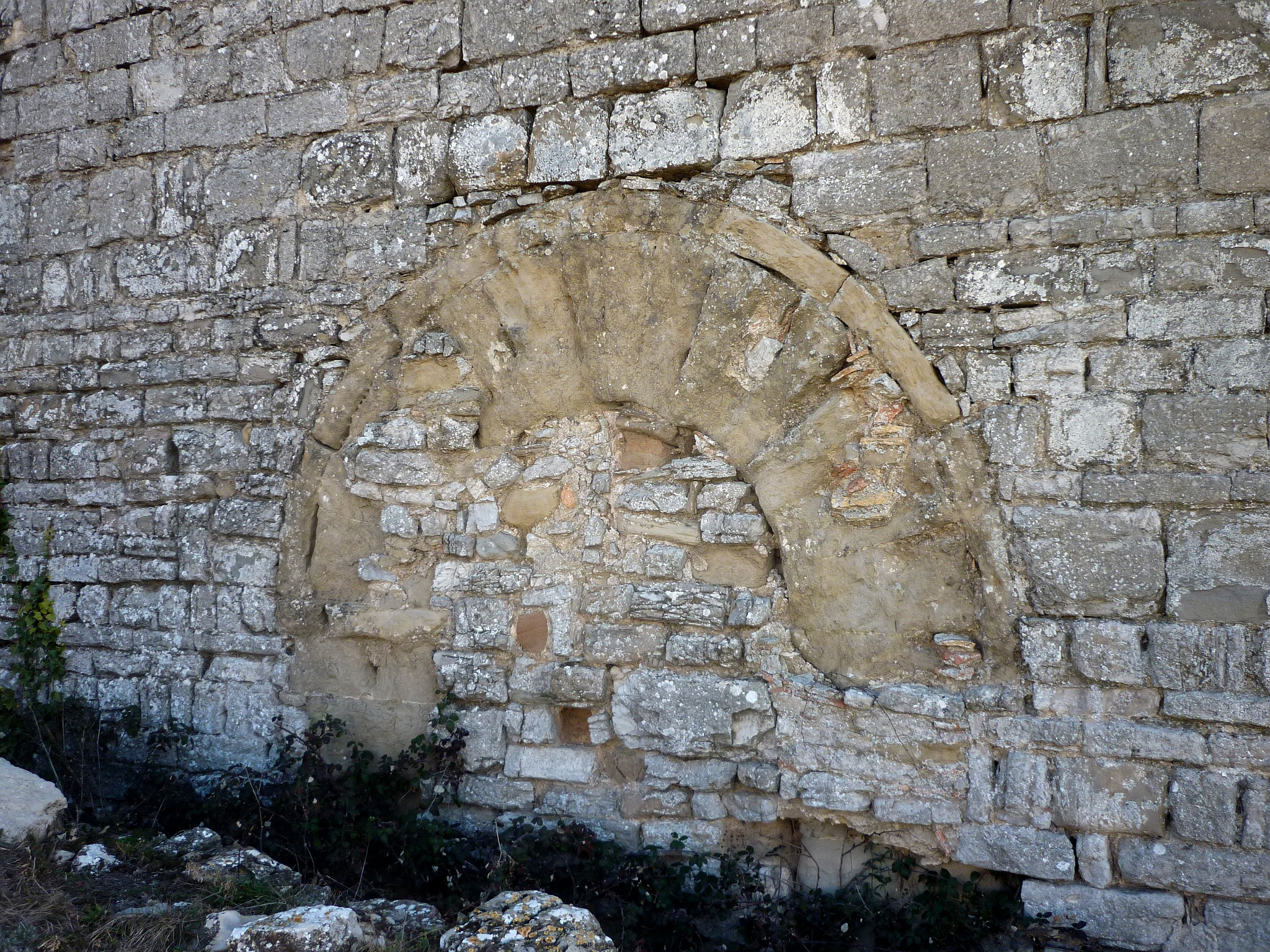 Església vella de la Molsosa: antic portal d'entrada paredat